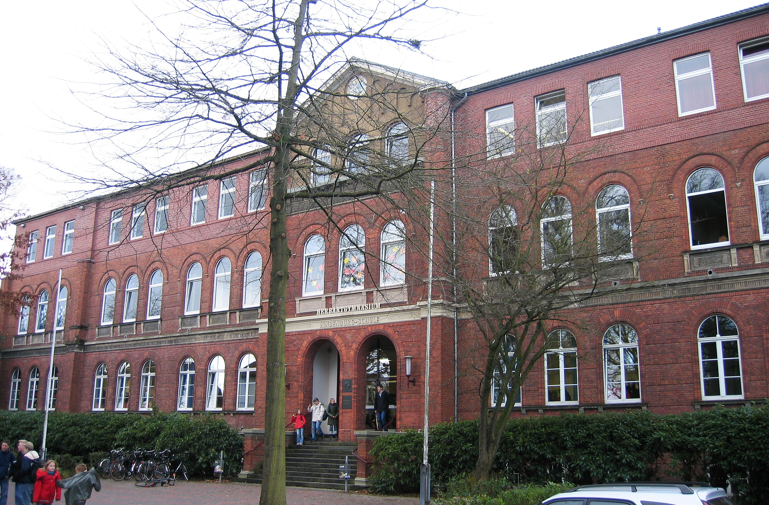 Das Portal des Herbartgymnasiums (vormals Hindenburgschule) in Oldenburg in Oldenburg